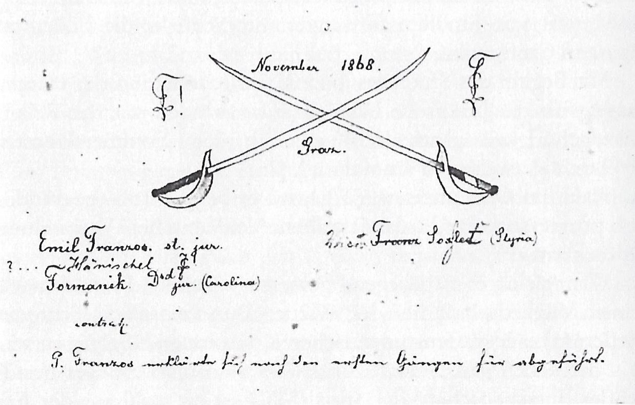 Säbelmensur Karl Emil Franzos gegen den Grazer Burschenschafter Victor Soxhlet